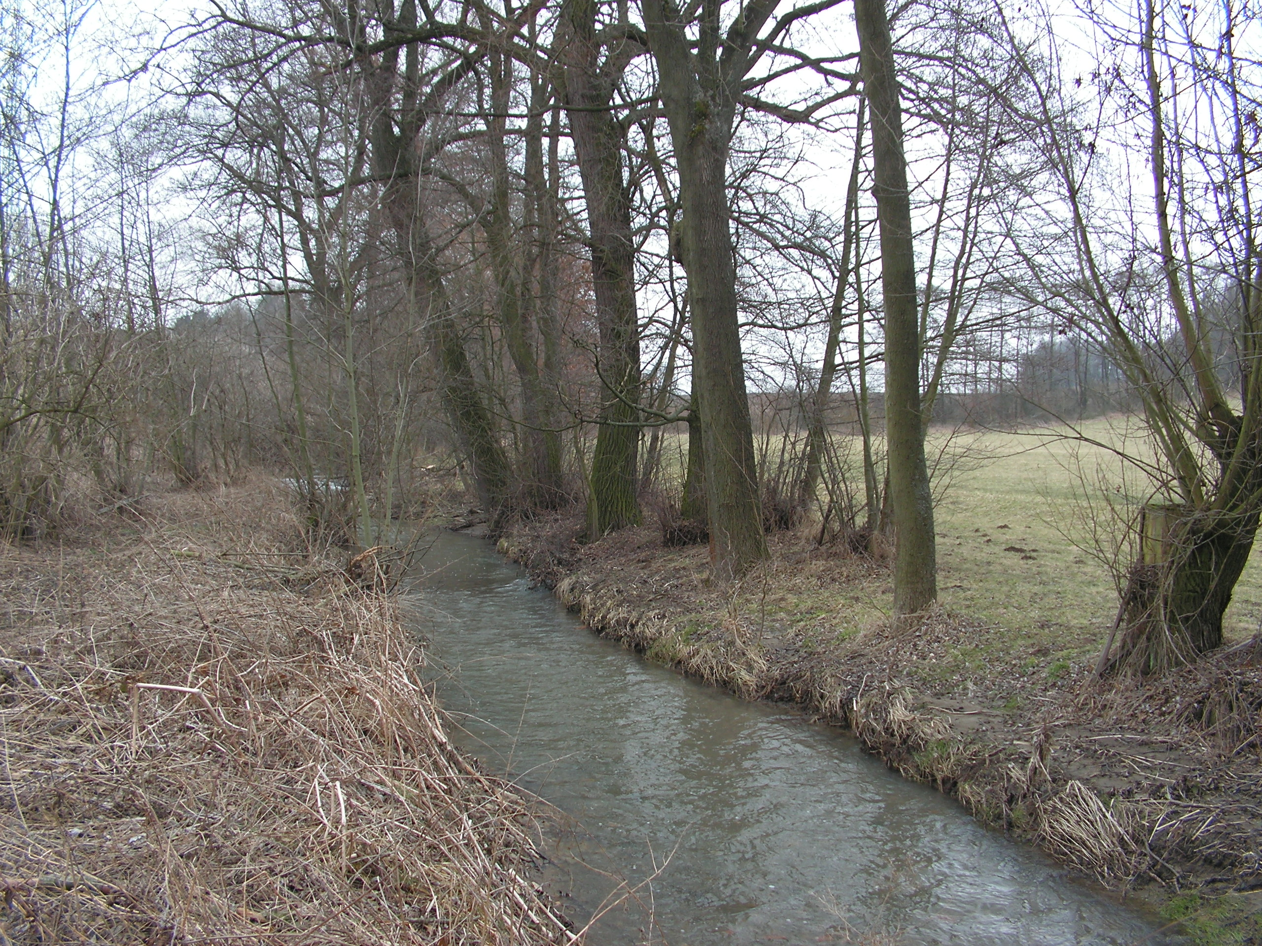 Potok Doubravka u Kamenných Mostů nedaleko soutoku s Hostačovkou